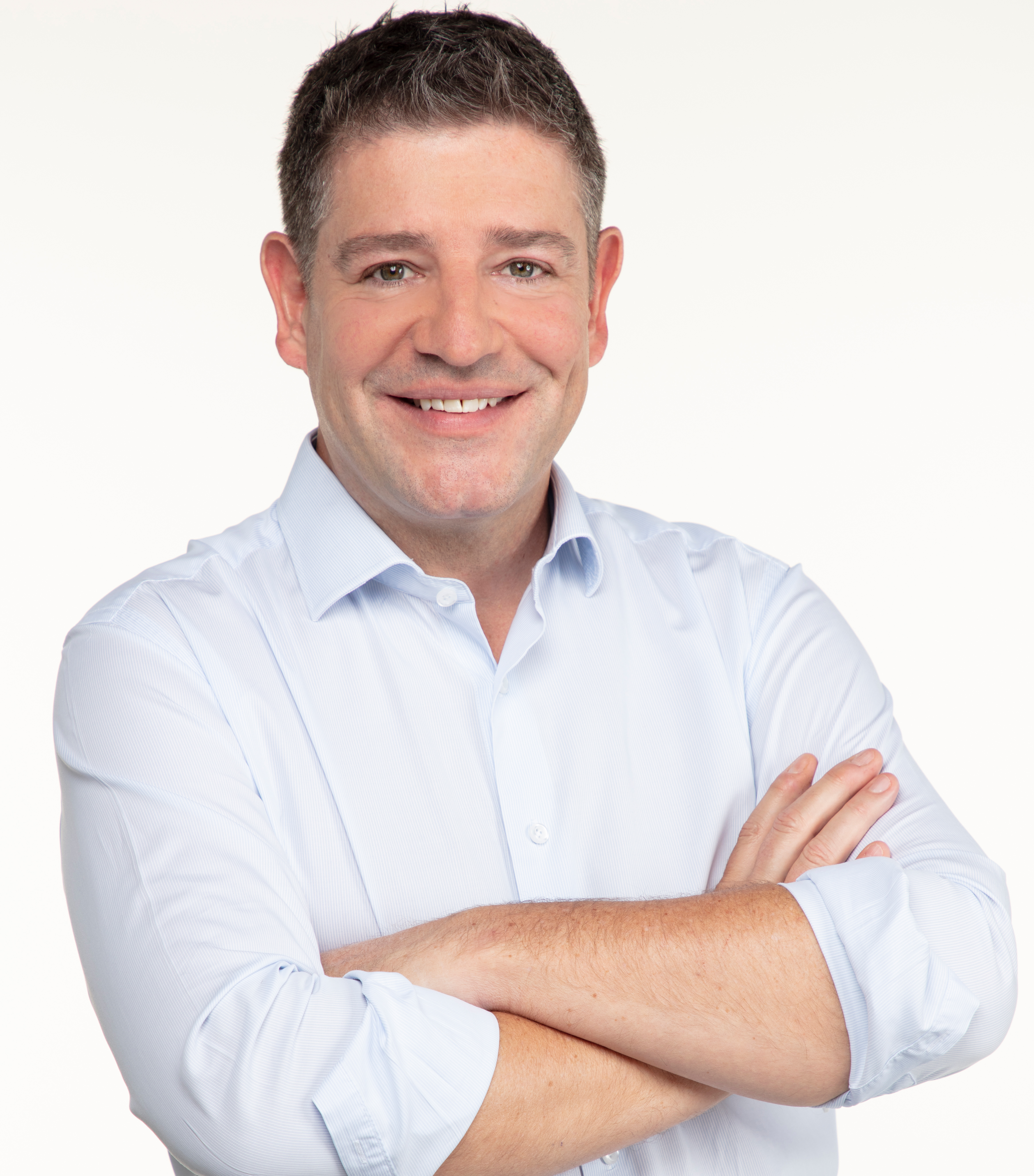 Portrait der Nationalratswahlen 2019